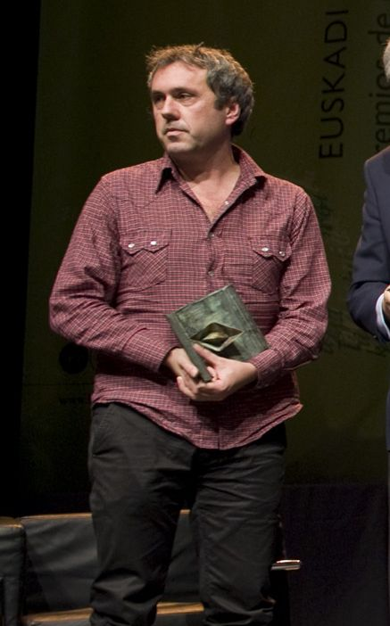 Fermin Etxegoien 2010ean (Euskadi Sarien jasotze-ekitaldian).